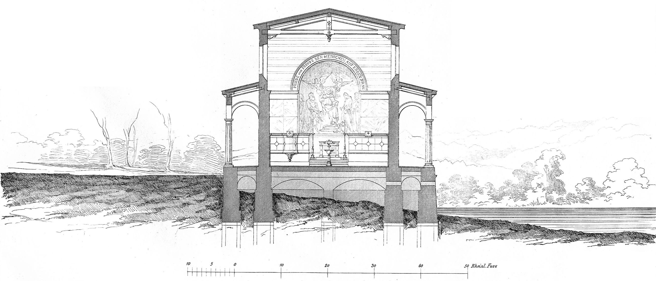 Querdurchschnitt der Kirche von Sacrow bei Potsdam